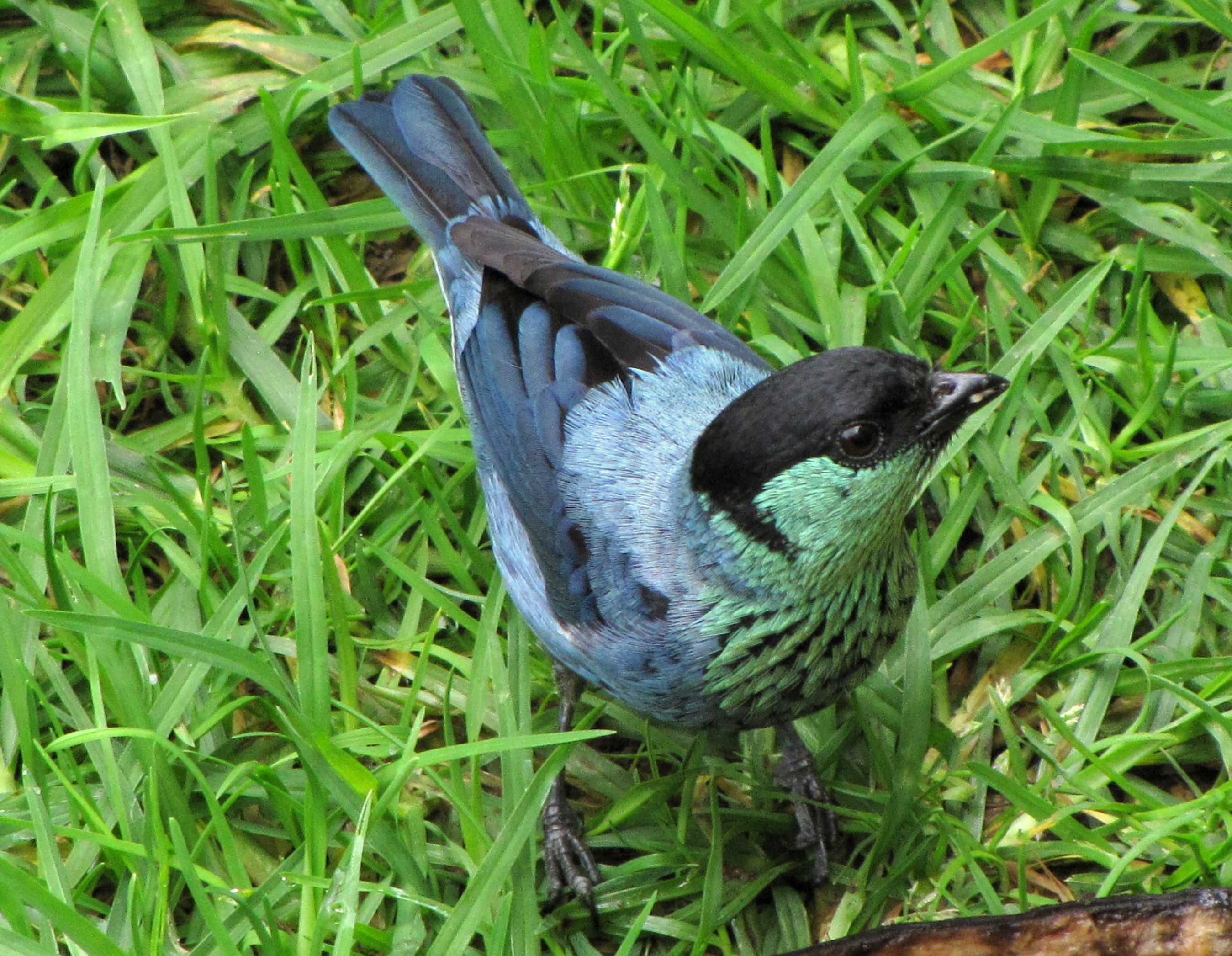 Tangara heinei (Tángara capirotada) - Macho